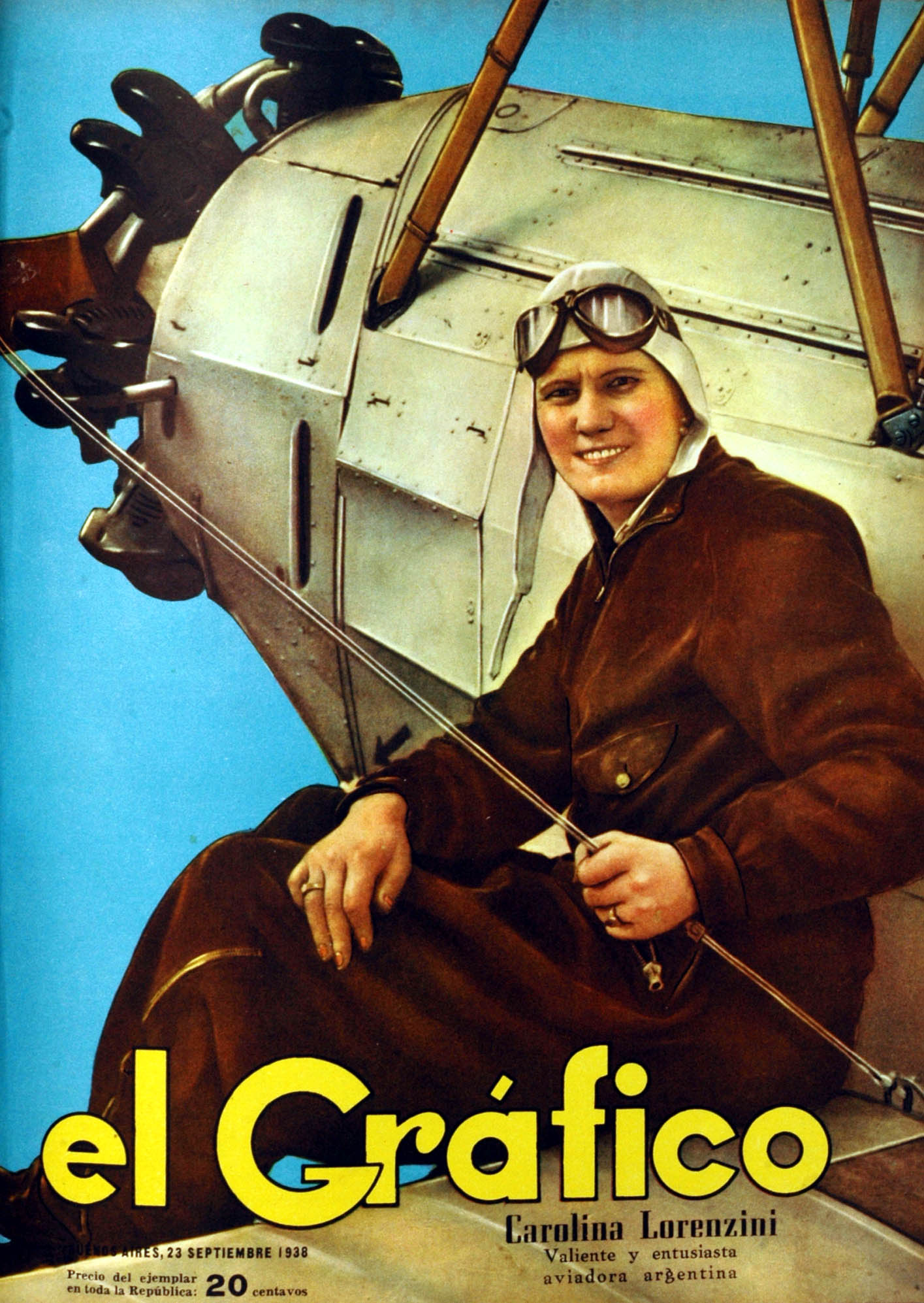 El Gráfico del 23 de Septiembre de 1938. Edición 1002.